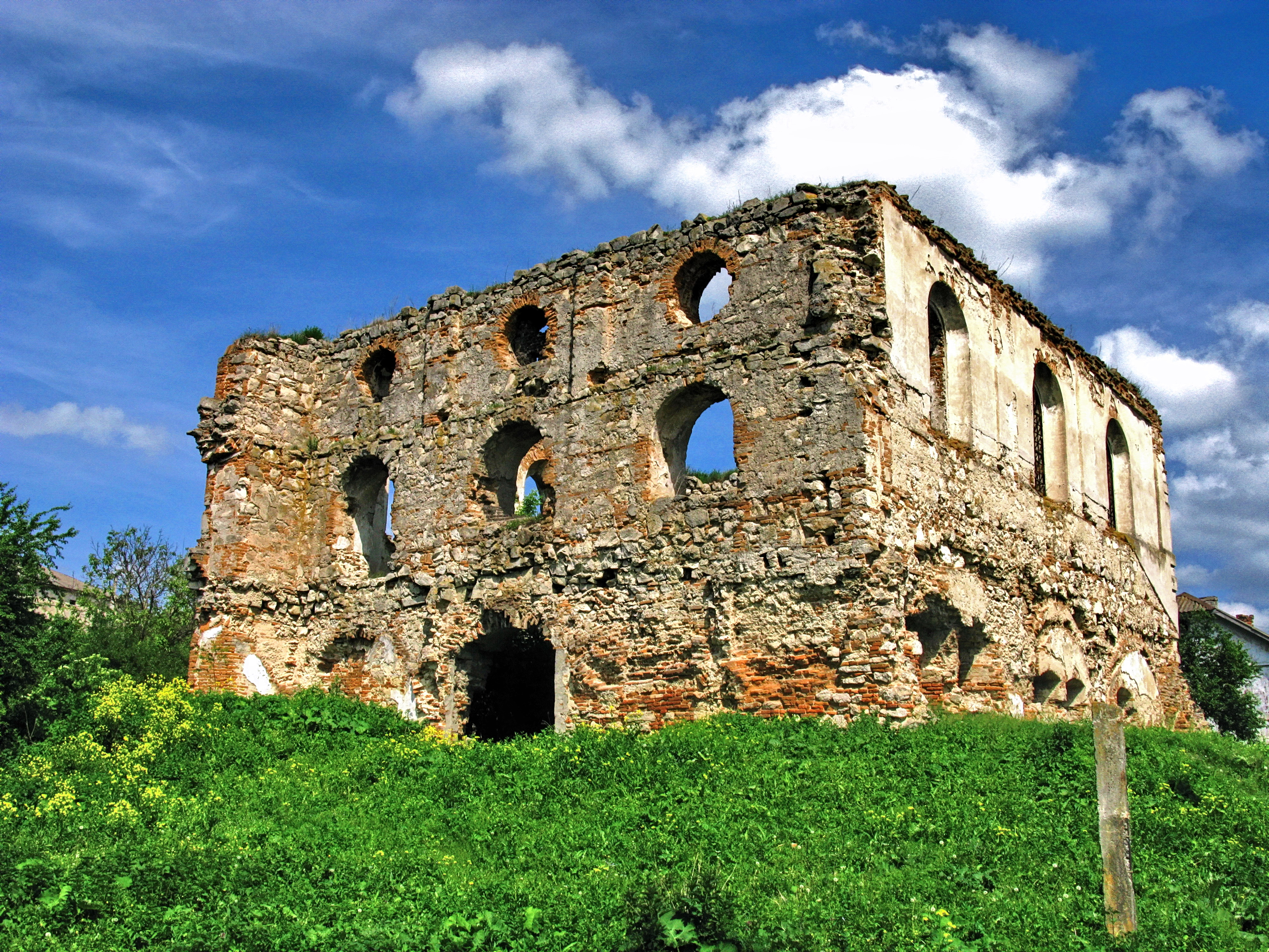 Синагога(мур.), Гримайлів